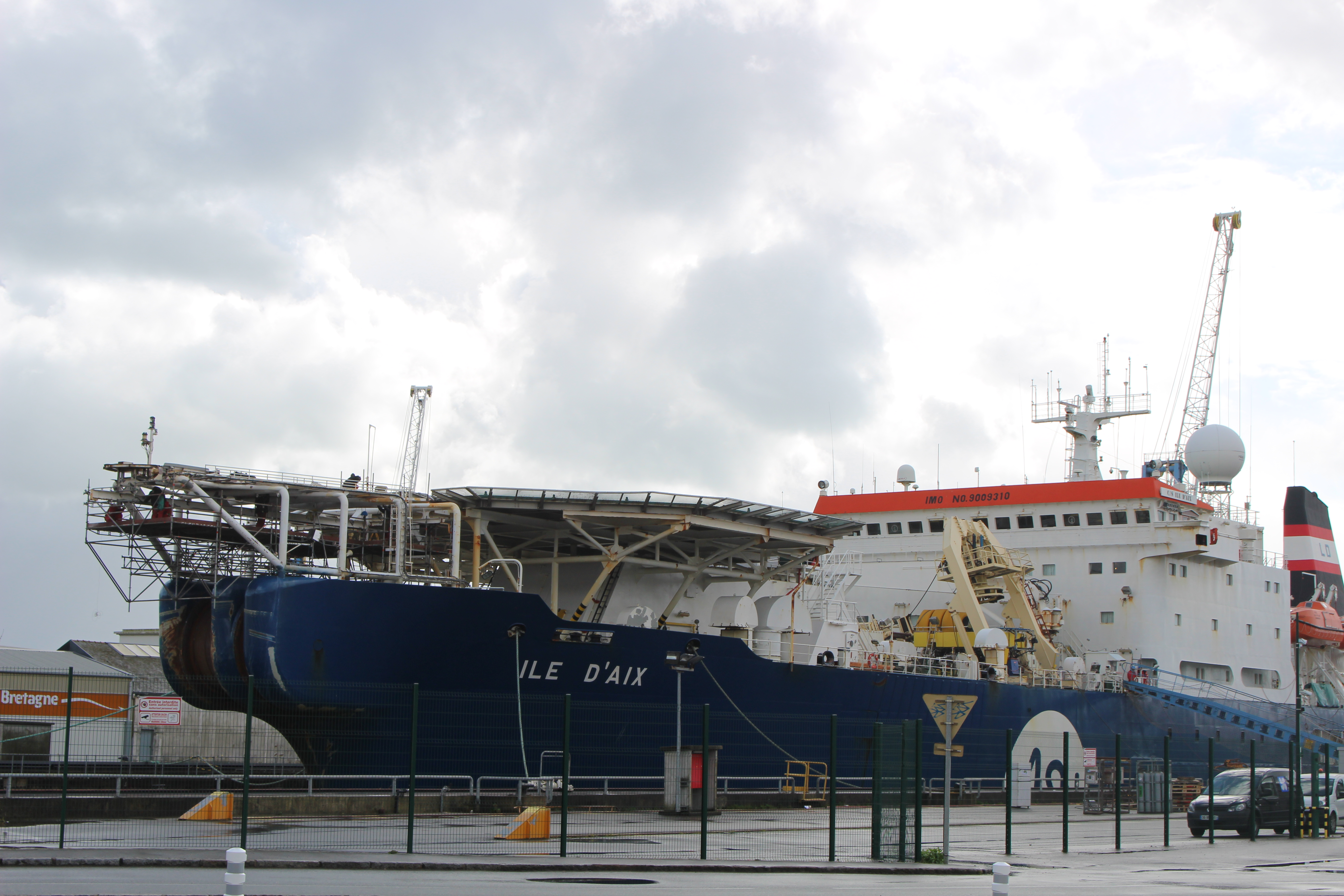 Câblier Île d'Aix dans le port de Brest le 17 mars 2019.